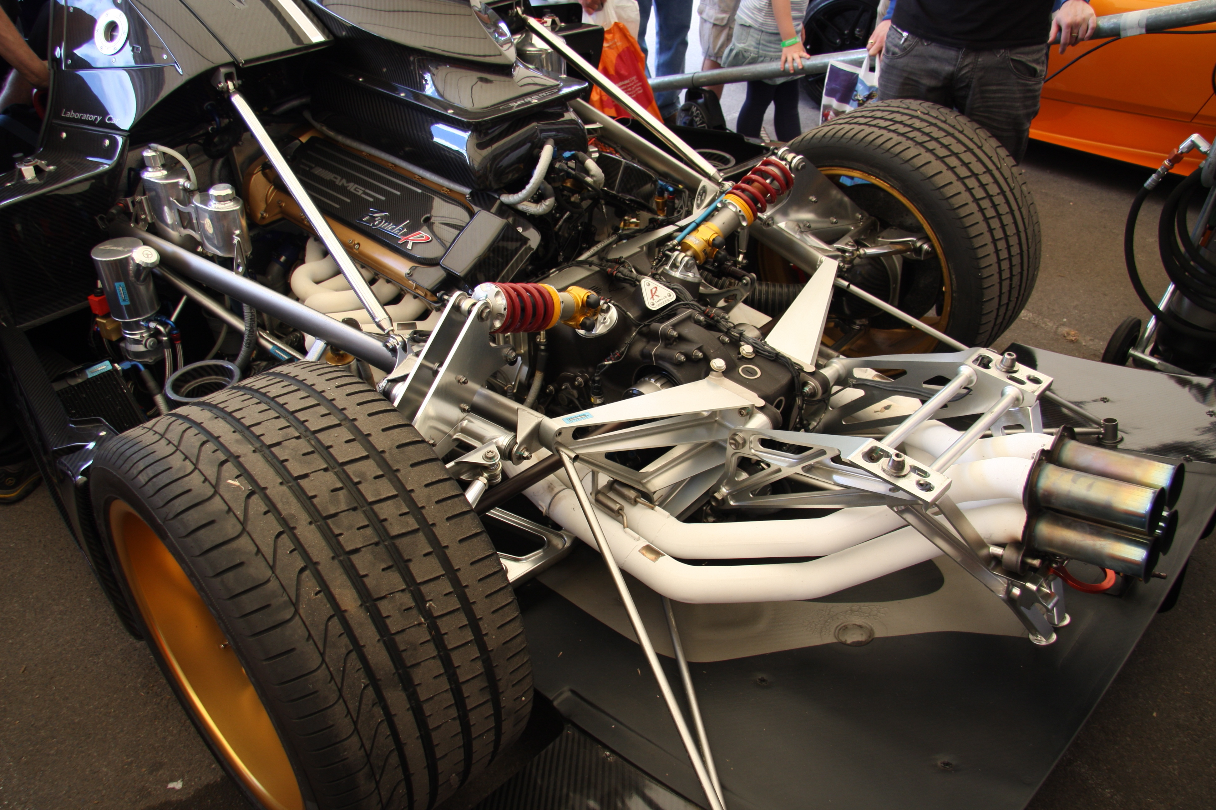 Pagani Zonda R engine